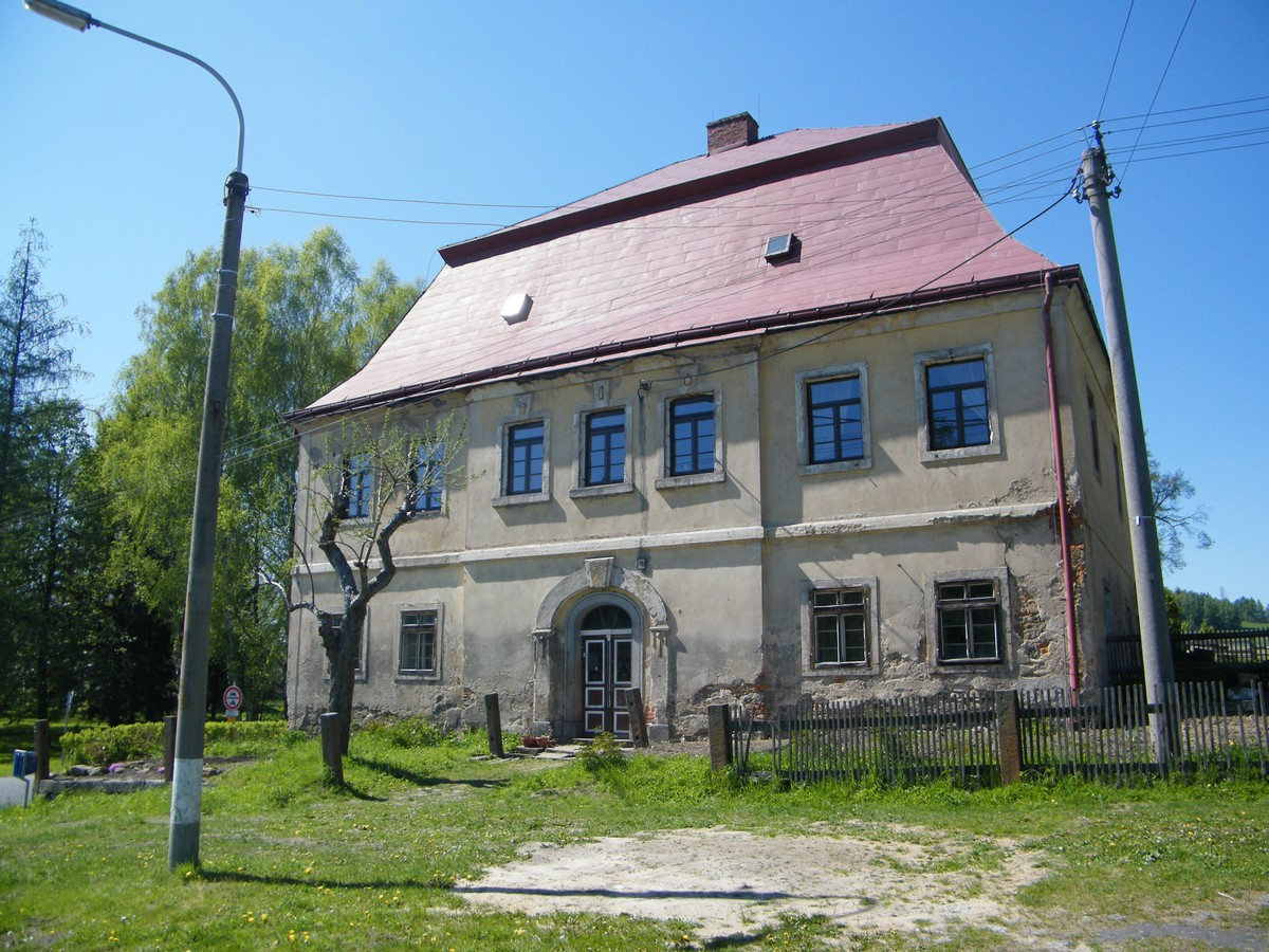 Kostel Navštívení Panny Marie v Lobendavě, fara